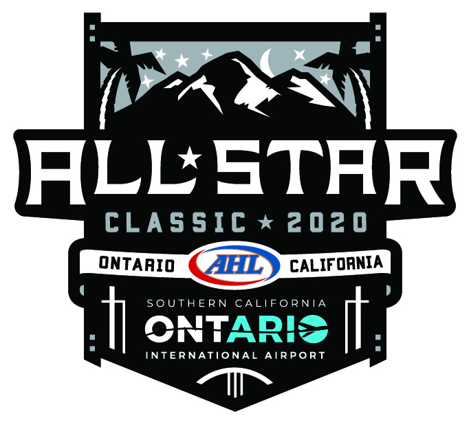 2020 AHL All Star Final Logo-01